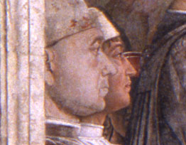 Mantegna, incontro, dettaglio